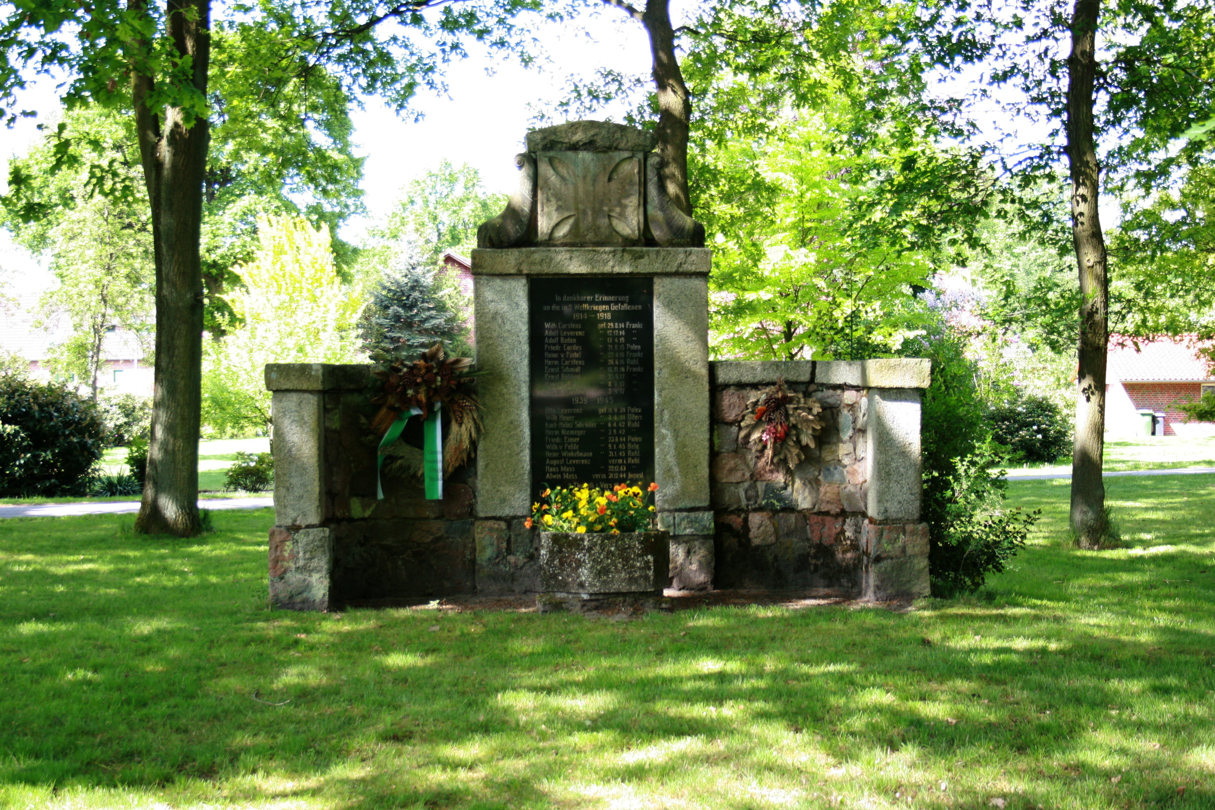 Brochdorf, Ortsteil vom Neuenkirchen (Lüneburger Heide)